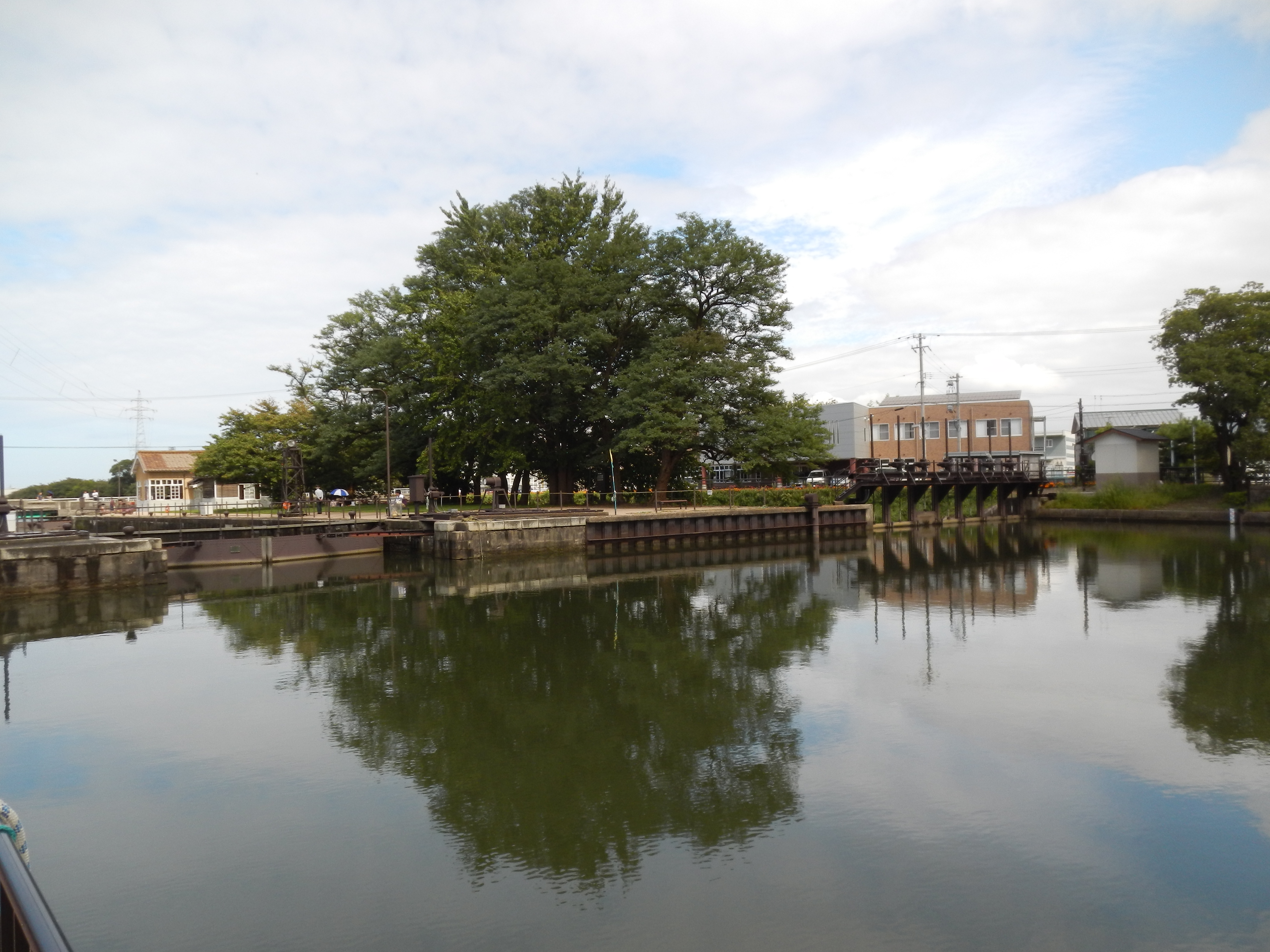 2 Kōjinmachi, Toyama-shi, Toyama-ken 930-0809, Japan